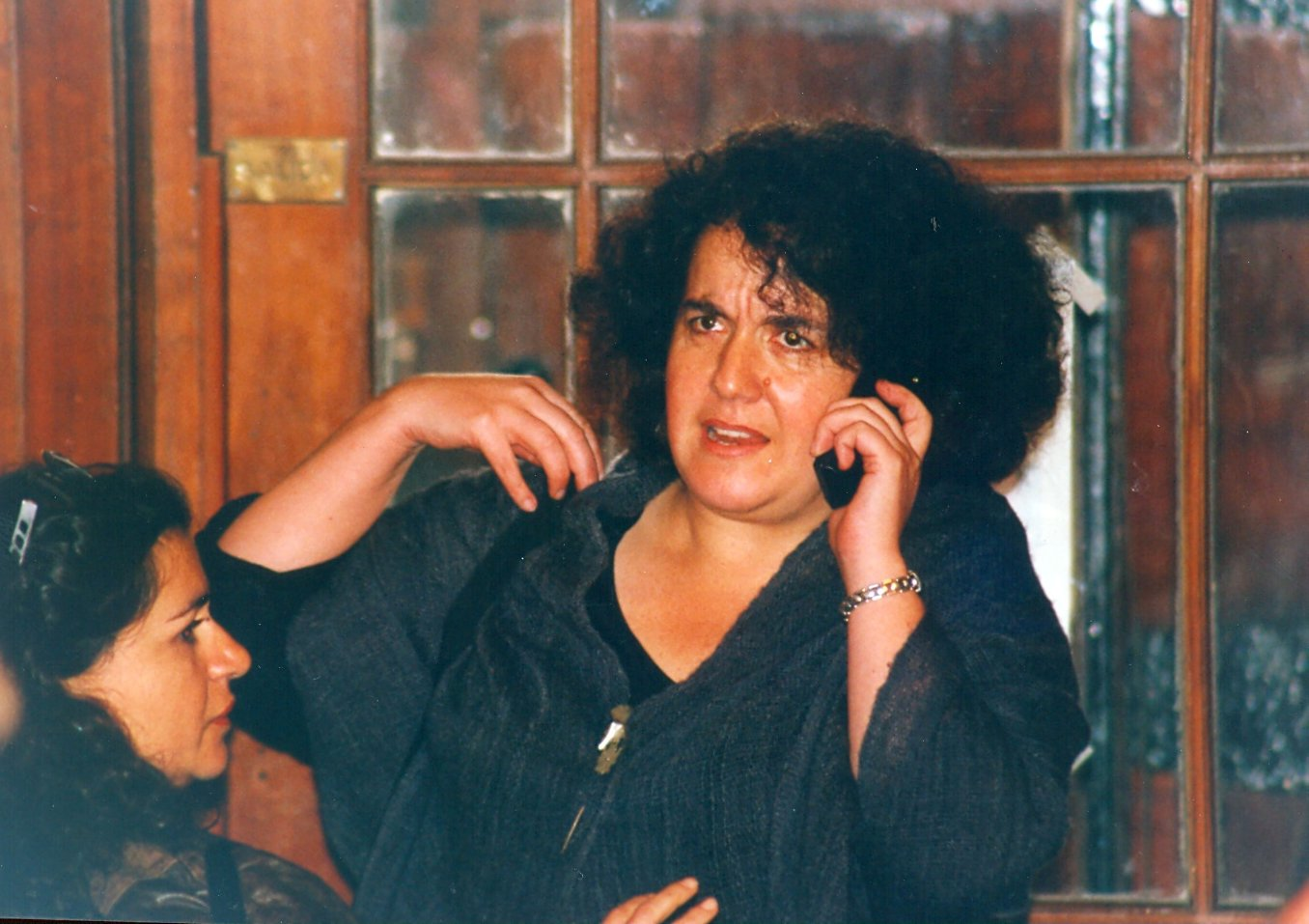 Directora Tatiana Gaviola (Chile); invitada especial; año 1997